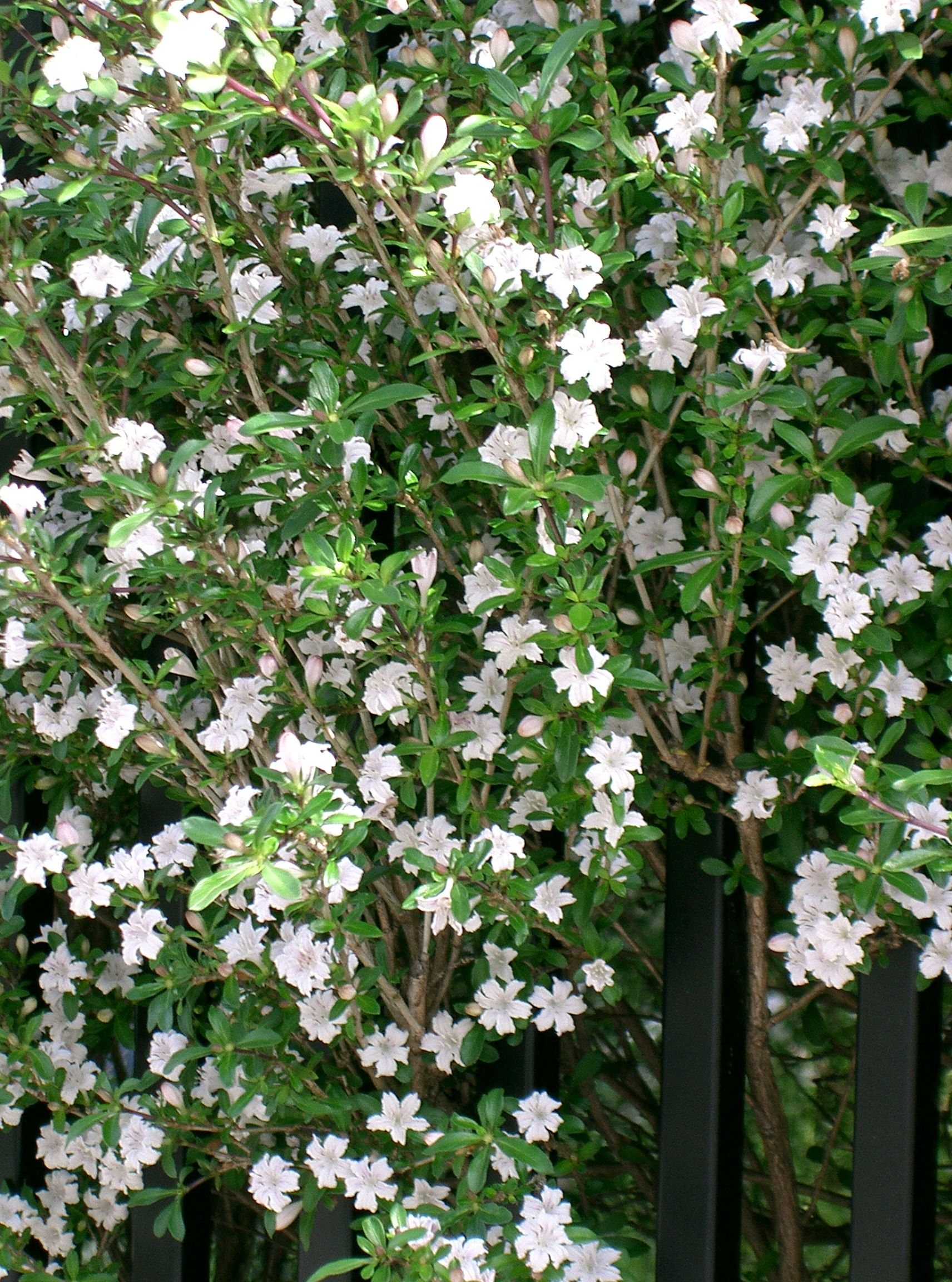 Serissa japonica